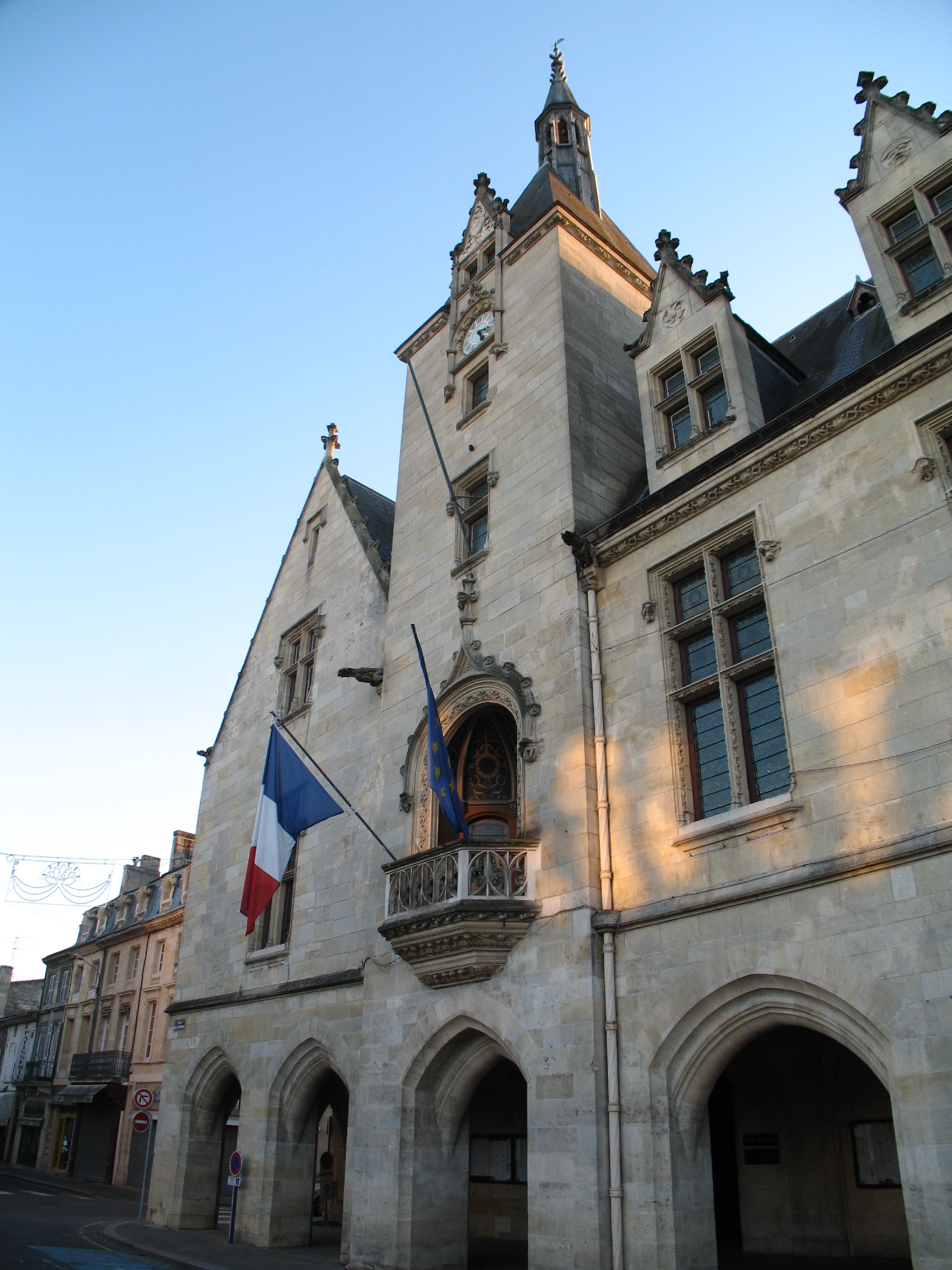 Hôtel de ville de Libourne, Gironde, France . Object location44° 54′ 52.2″ N, 0° 14′ 43.6″ W